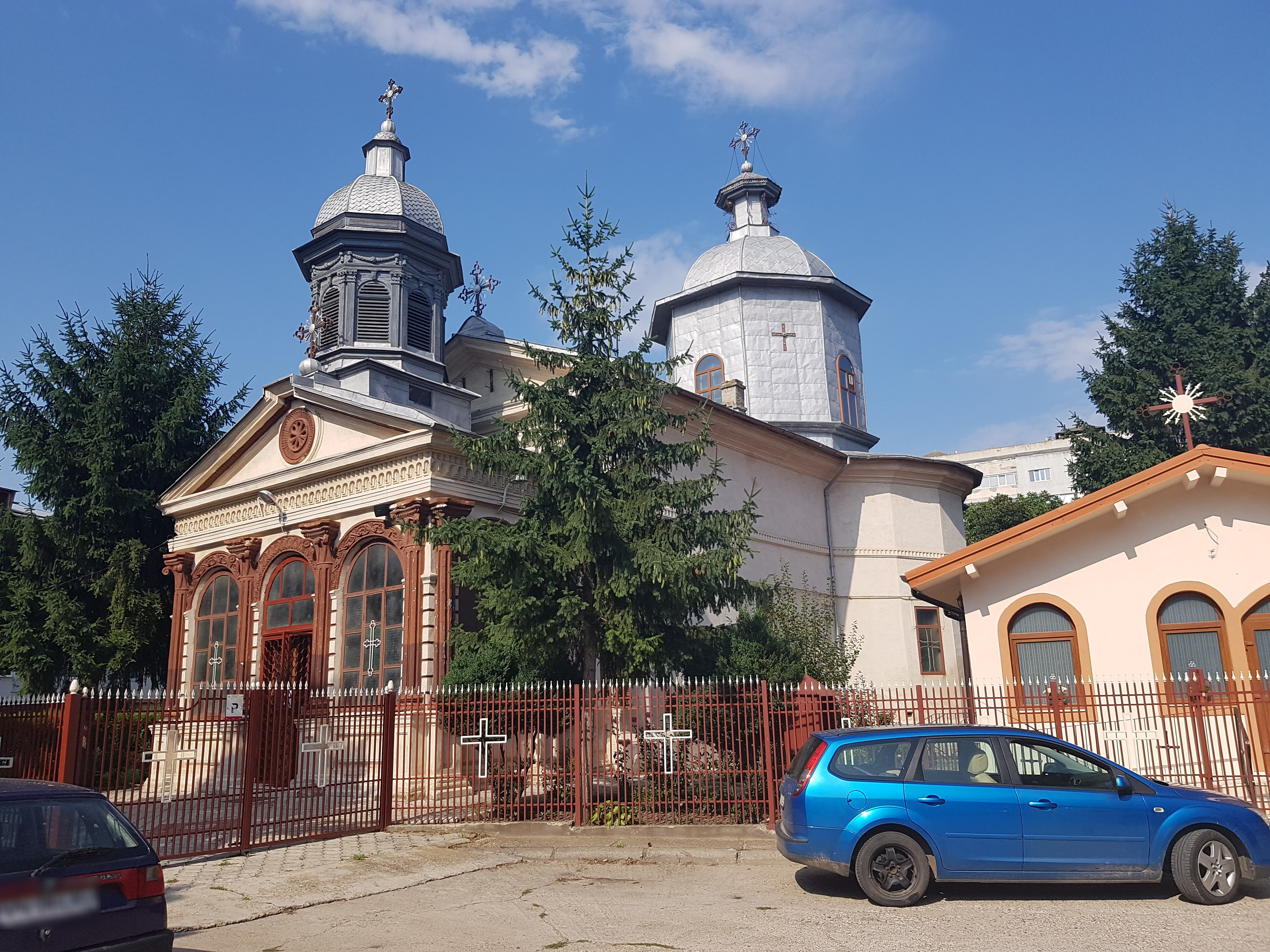 Biserica „Sf. Nicolae” - Vechi